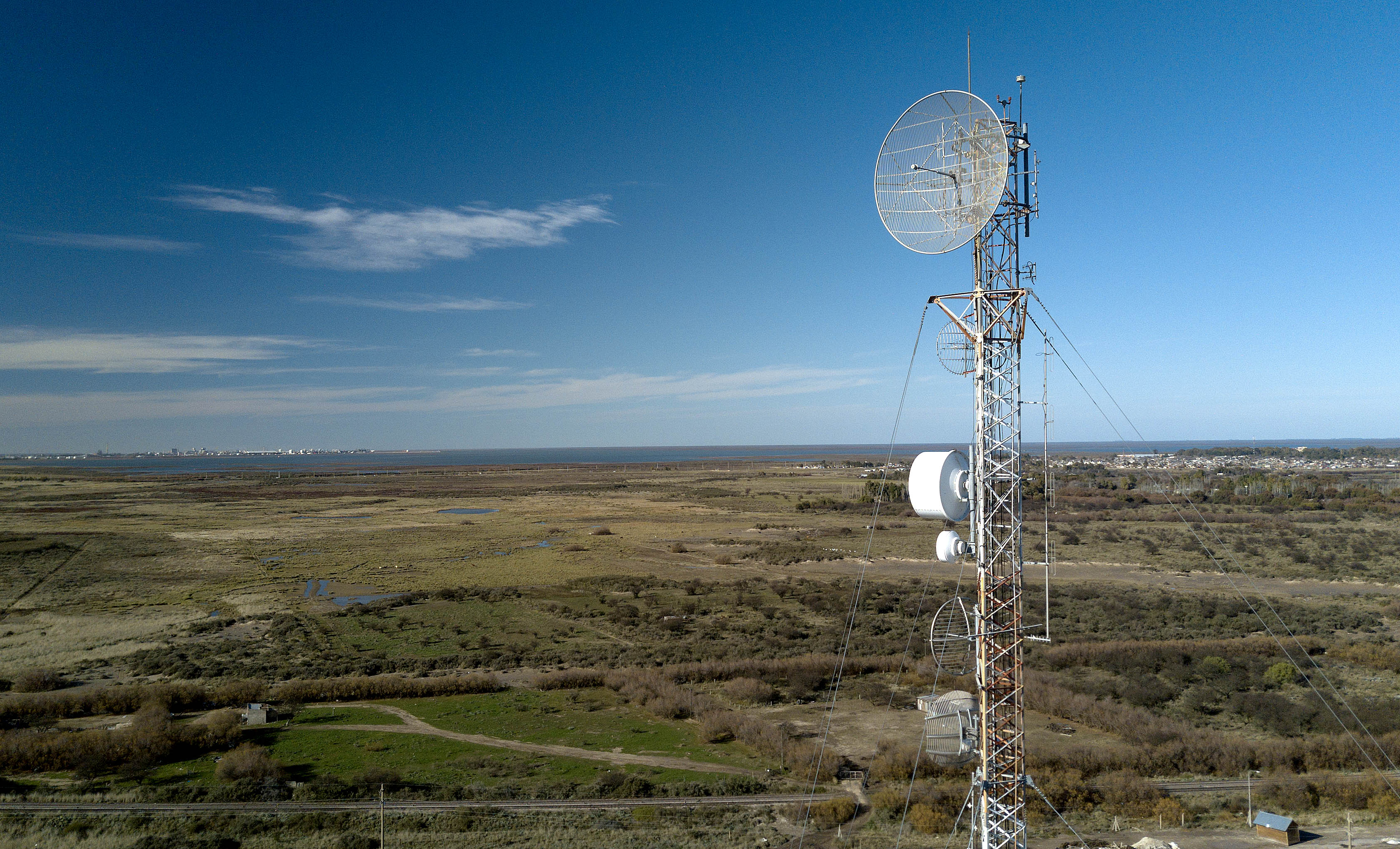 Imagen de la planta de TGS